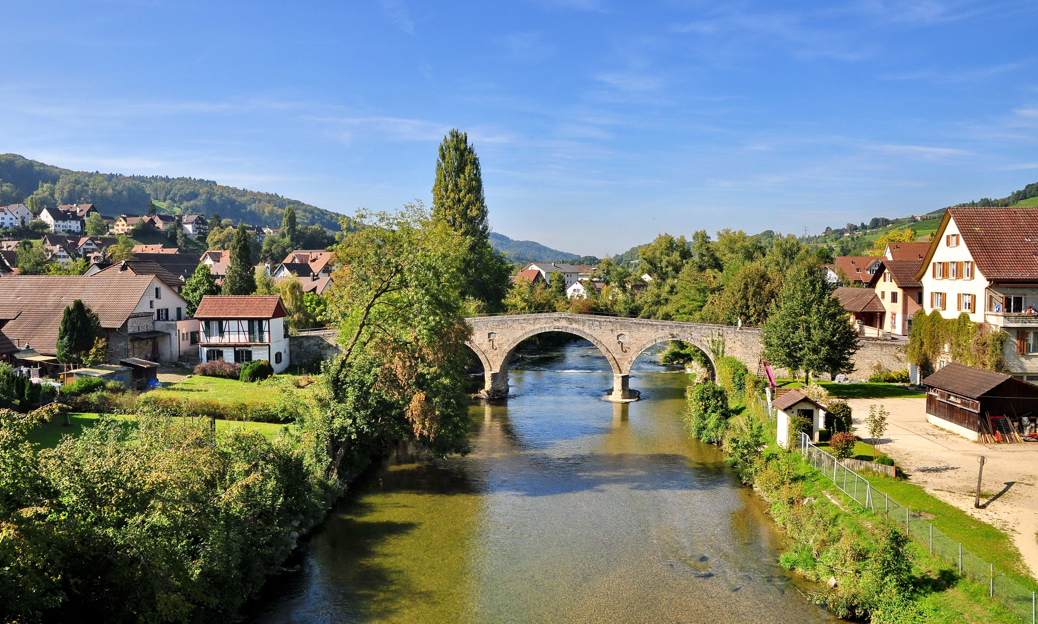 Steinbrücke, sogenannte «Römerbrücke» in Rorbas (Switzerland)